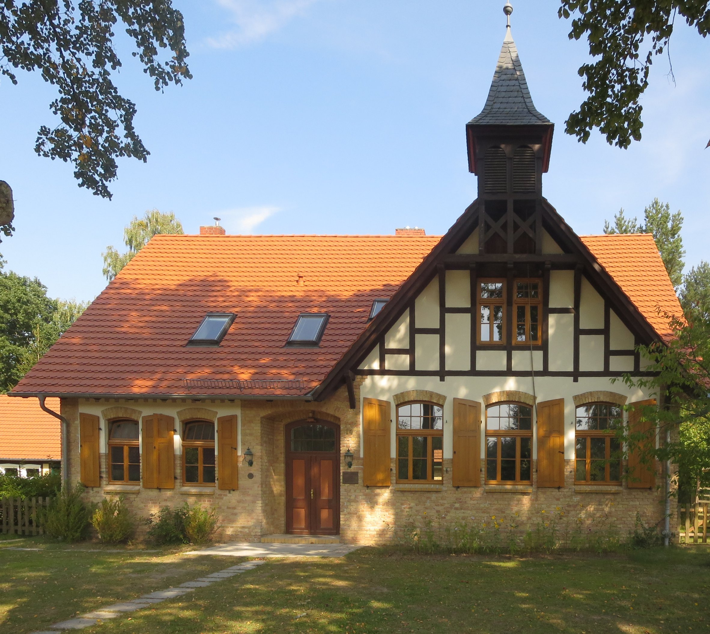 Bebersee, Alte Schule